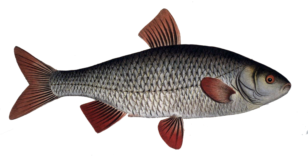 Rutilus rutilus